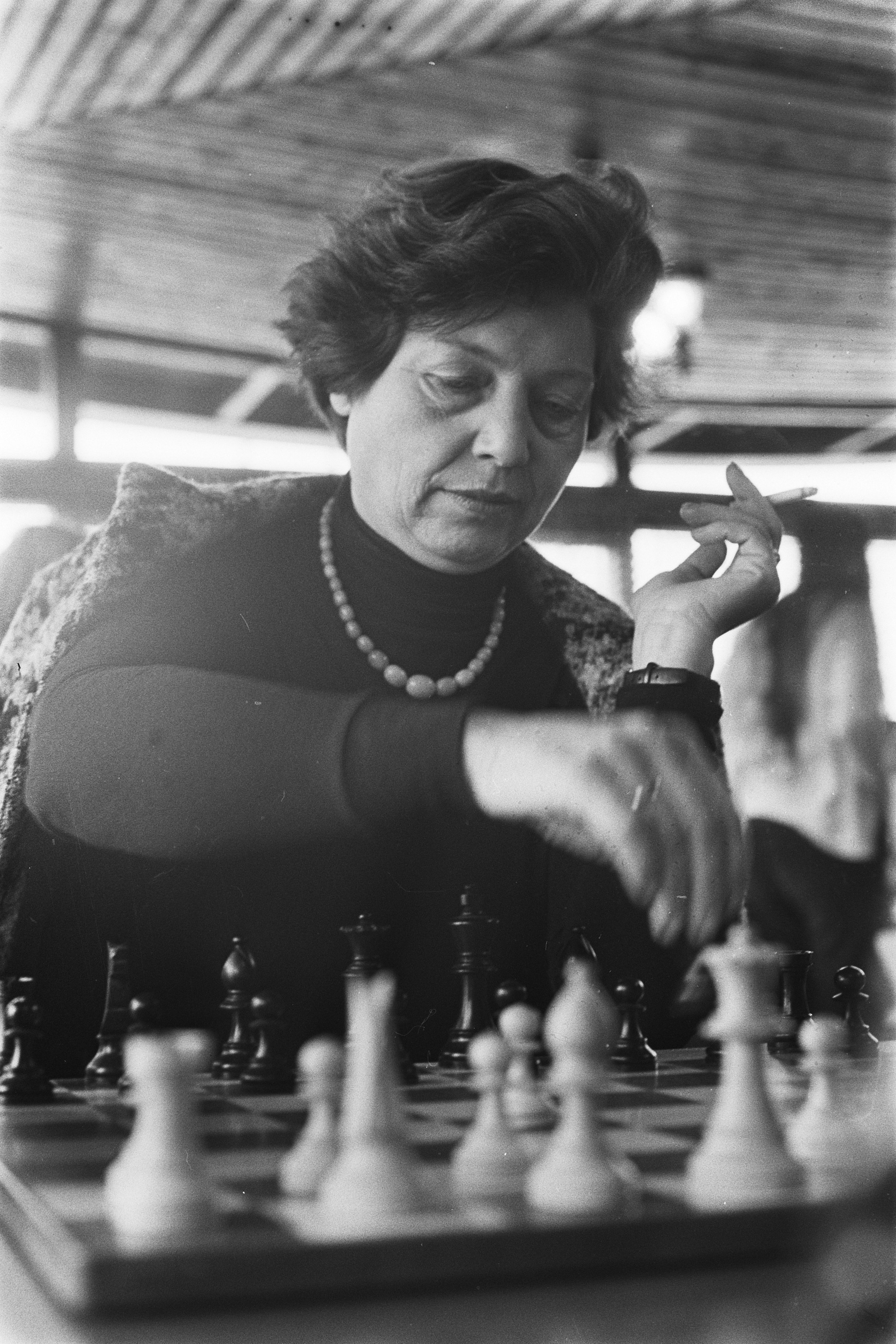 Collectie / Archief : Fotocollectie Anefo Reportage / Serie : [ onbekend ] Beschrijving : Dameskampioenschap schaken in Mijdrecht; Corrie Vreeken op gedeelde eerste plaats Datum : 17 mei 1977 Locatie : Mijdrecht, Zuid-Holland Trefwoorden : kampioenschappen, schaken, vrouwen Persoonsnaam : Vreeken-Bouwman, Corrie Fotograaf : Verhoeff, Bert / Anefo Auteursrechthebbende : Nationaal Archief Materiaalsoort : Negatief (zwart/wit) Nummer archiefinventaris : bekijk toegang 2.24.01.05 Bestanddeelnummer : 929-1806